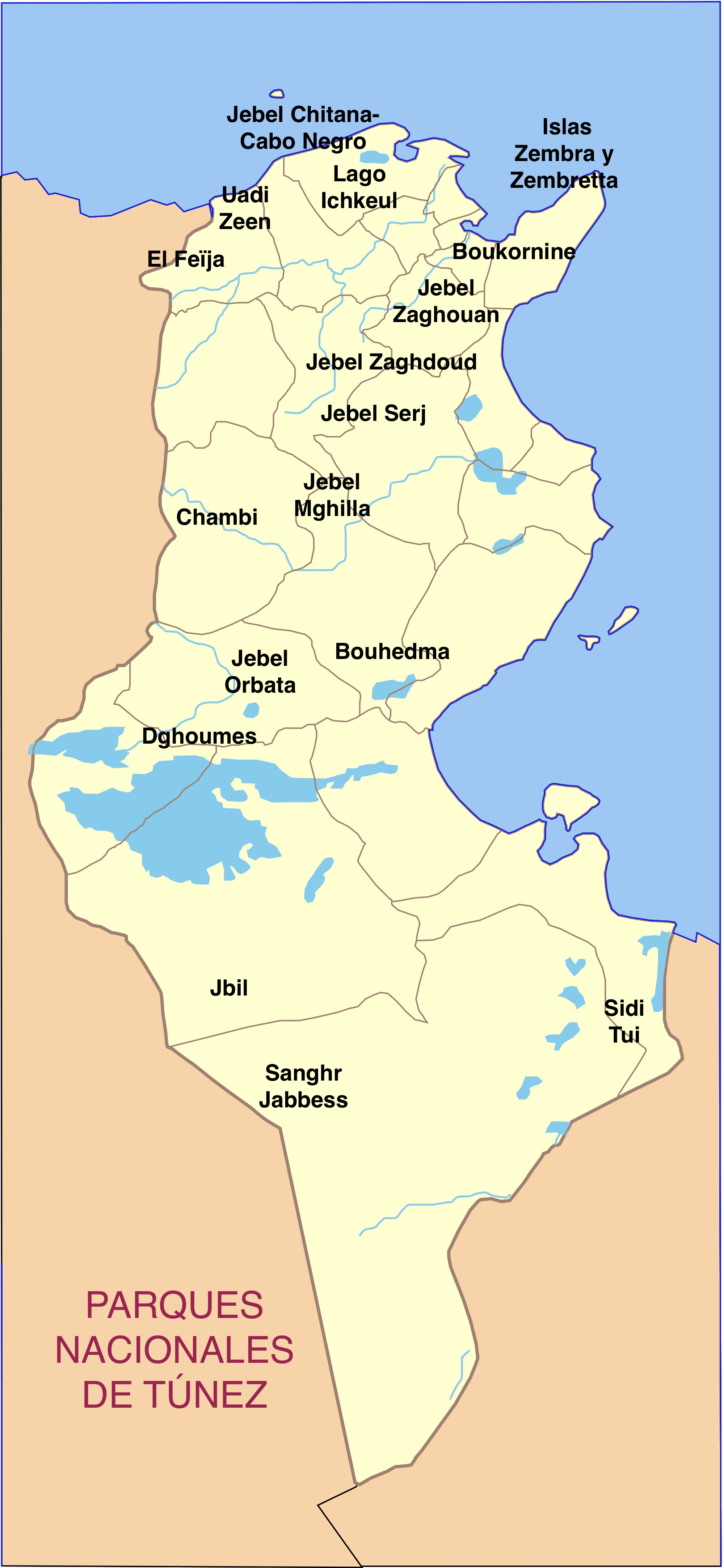 Mapa de parques nacionales de Túnez